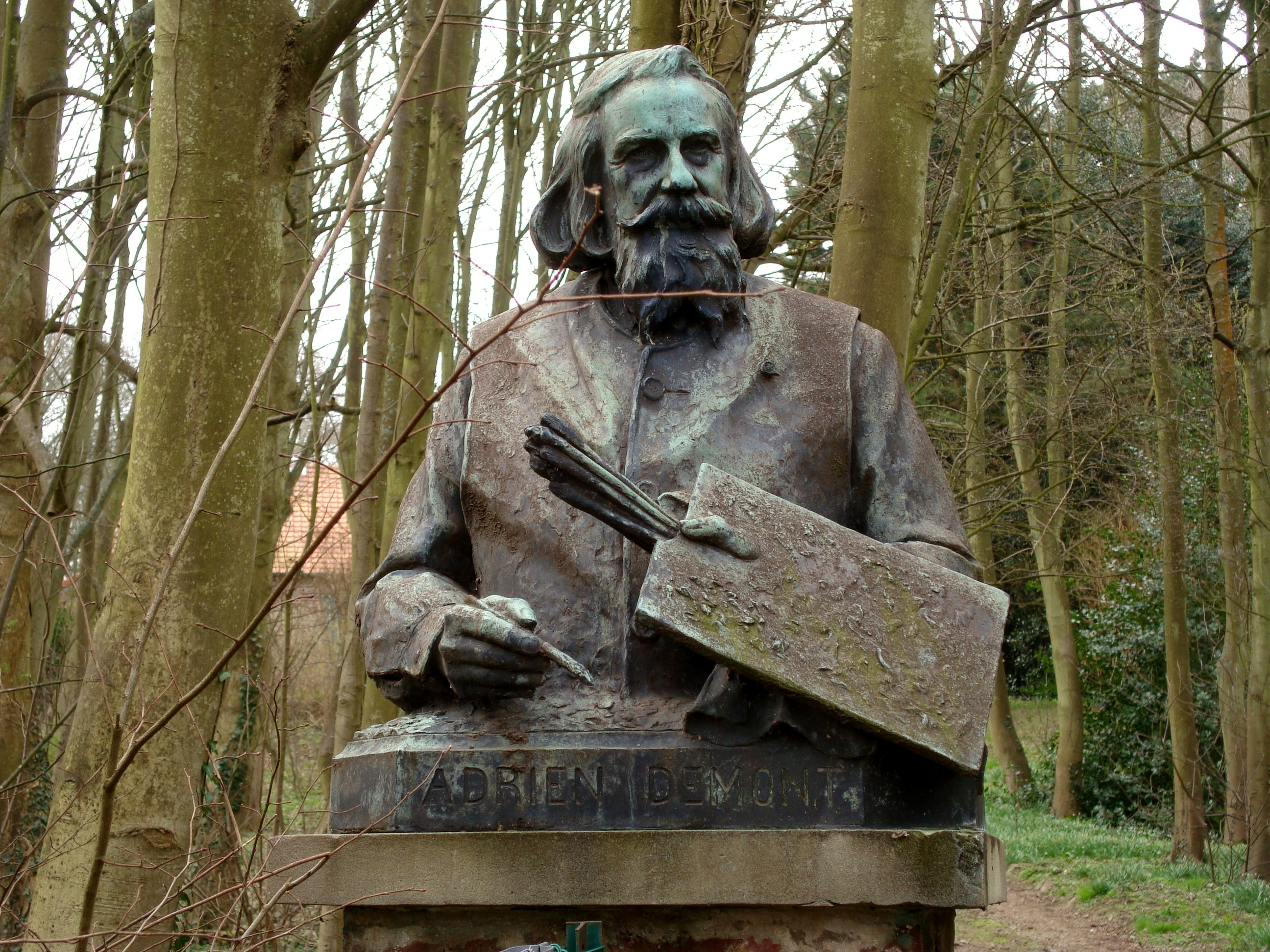 Buste du peintre Adrien Demont à Wissant (Pas-de-Calais).